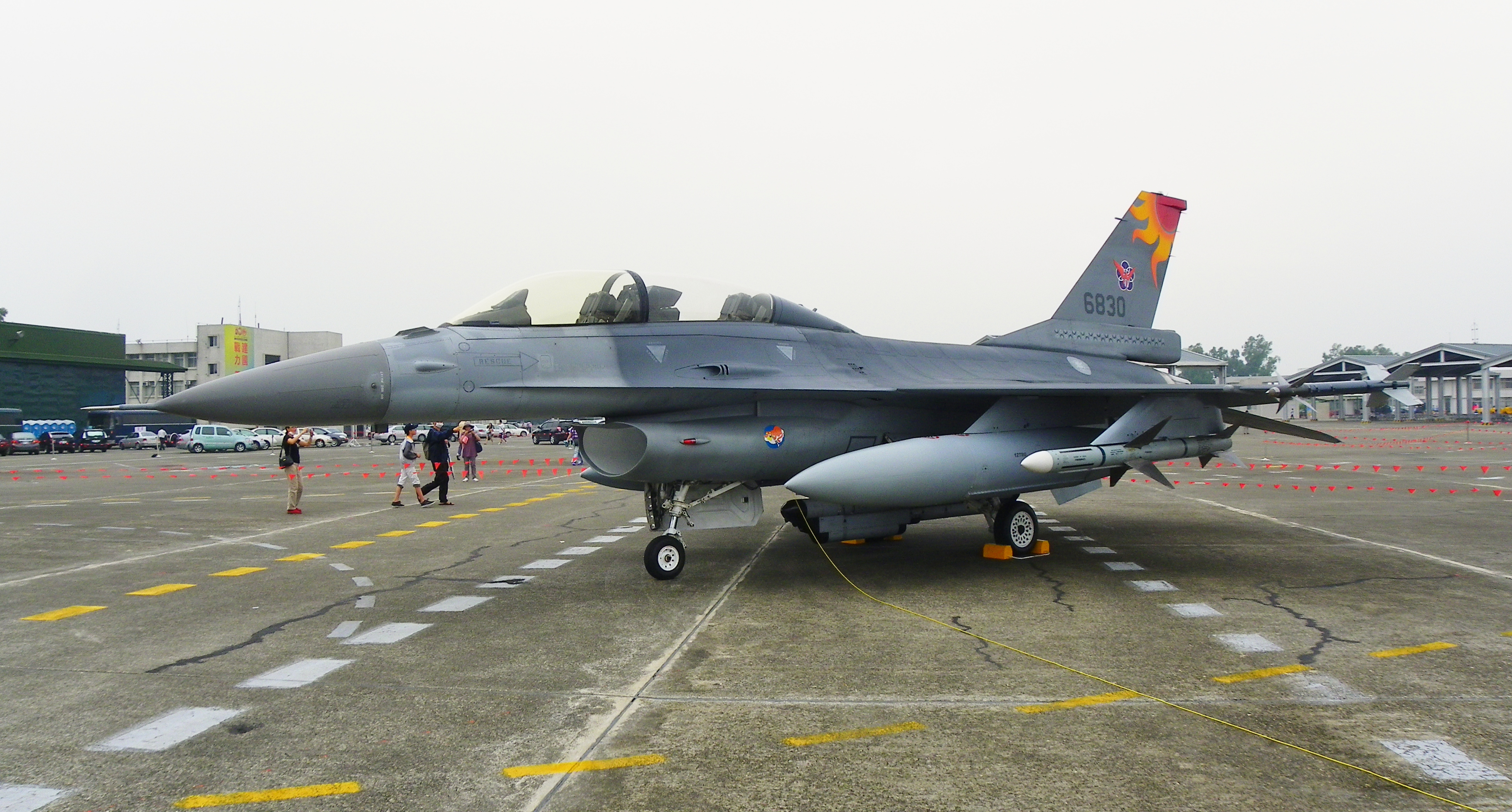 岡山空軍基地展示中的401聯隊F-16B 6830。